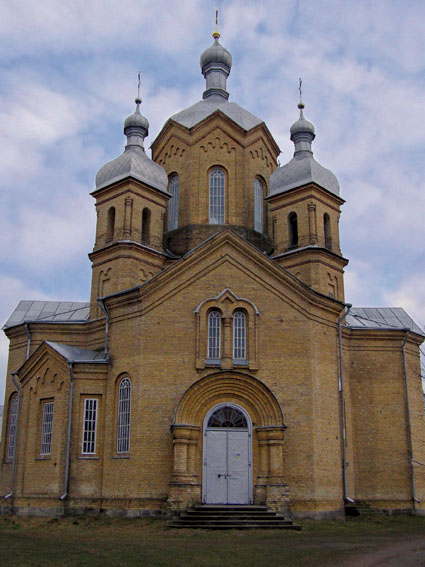 Успенський собор у Переяслав-Хмельницькому